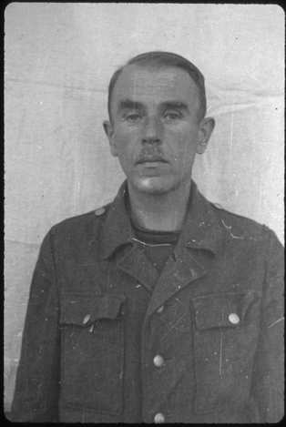 Albin Gretsch (* 1899 in Augsburg; † unbekannt) war SS-Unterscharführer und im Außenlager Riederloh des KZ Dachau eingesetzt. Im Dachau-Hauptprozess wurde Gretsch zu 10 Jahren Haft verurteilt.